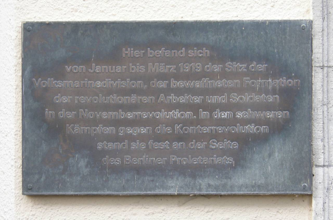 Gedenktafel für die Volksmariendivision. Märkisches Ufer 48, Berlin-Mitte. Enthüllt am 11. November 1980.